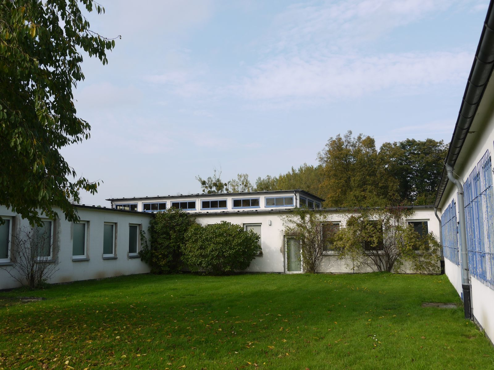 Schachtanlage Hannoversche Treue Süd - Innenhof der Tagesanlagen - Aufnahme 2010